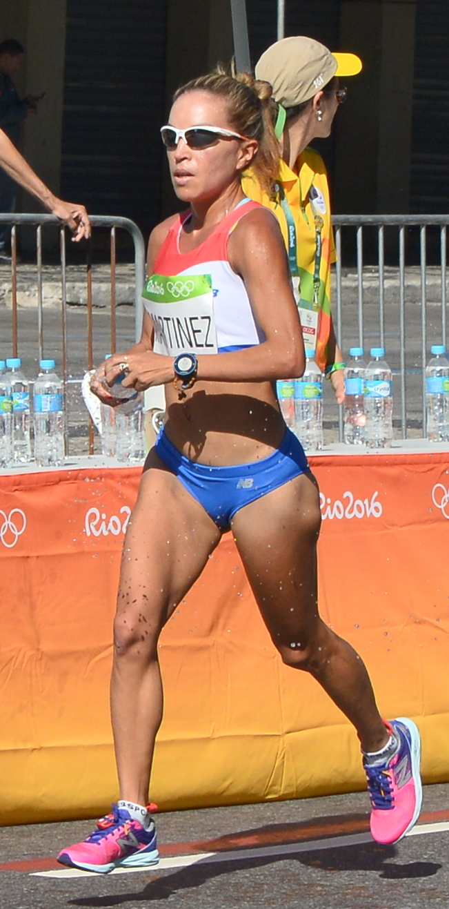 Passage du marathon des jeux olympiques de Rio 2016 dans le centre de Rio